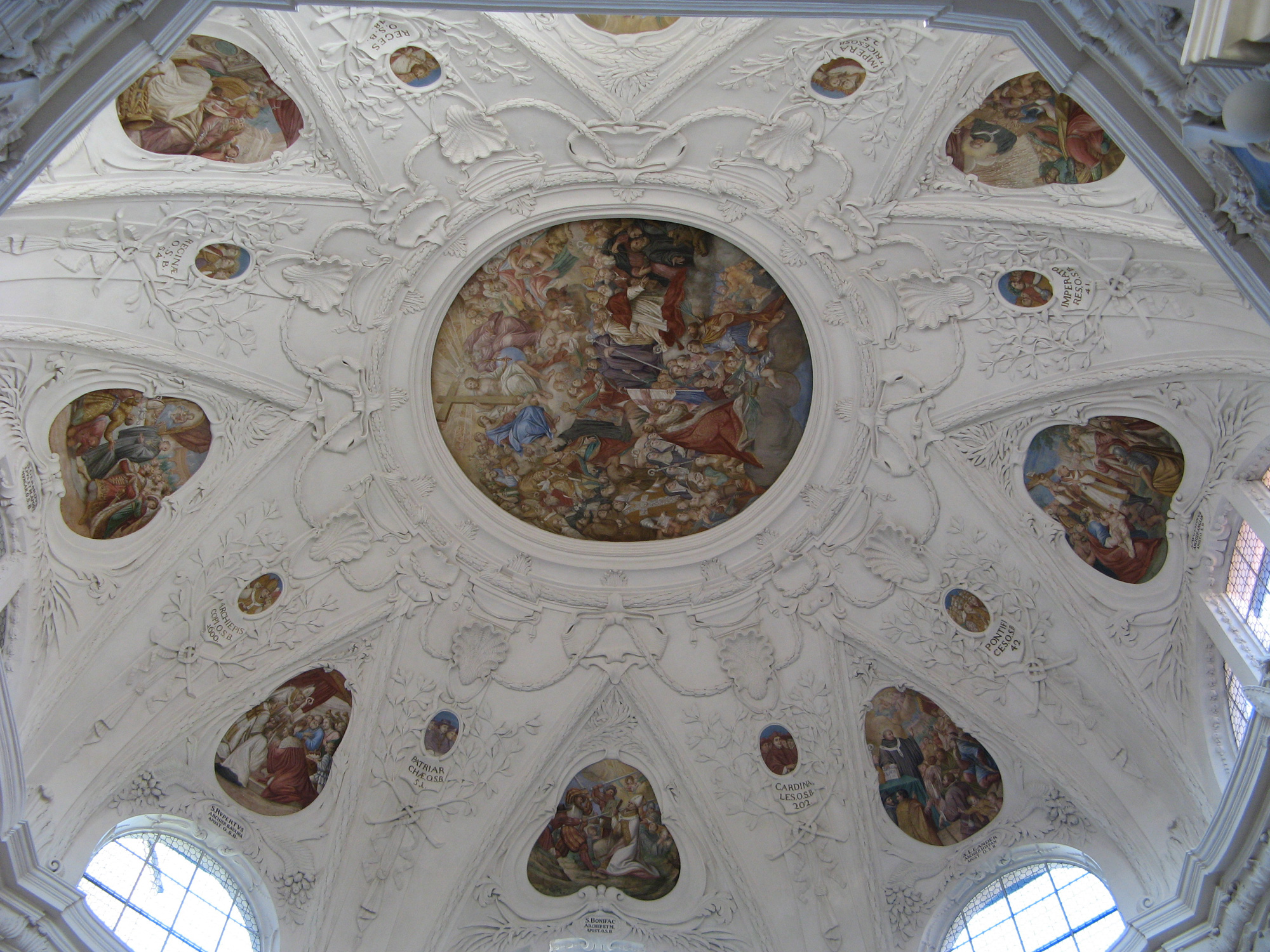 Fresken an der Kuppeldecke der Klosterkirche Muri